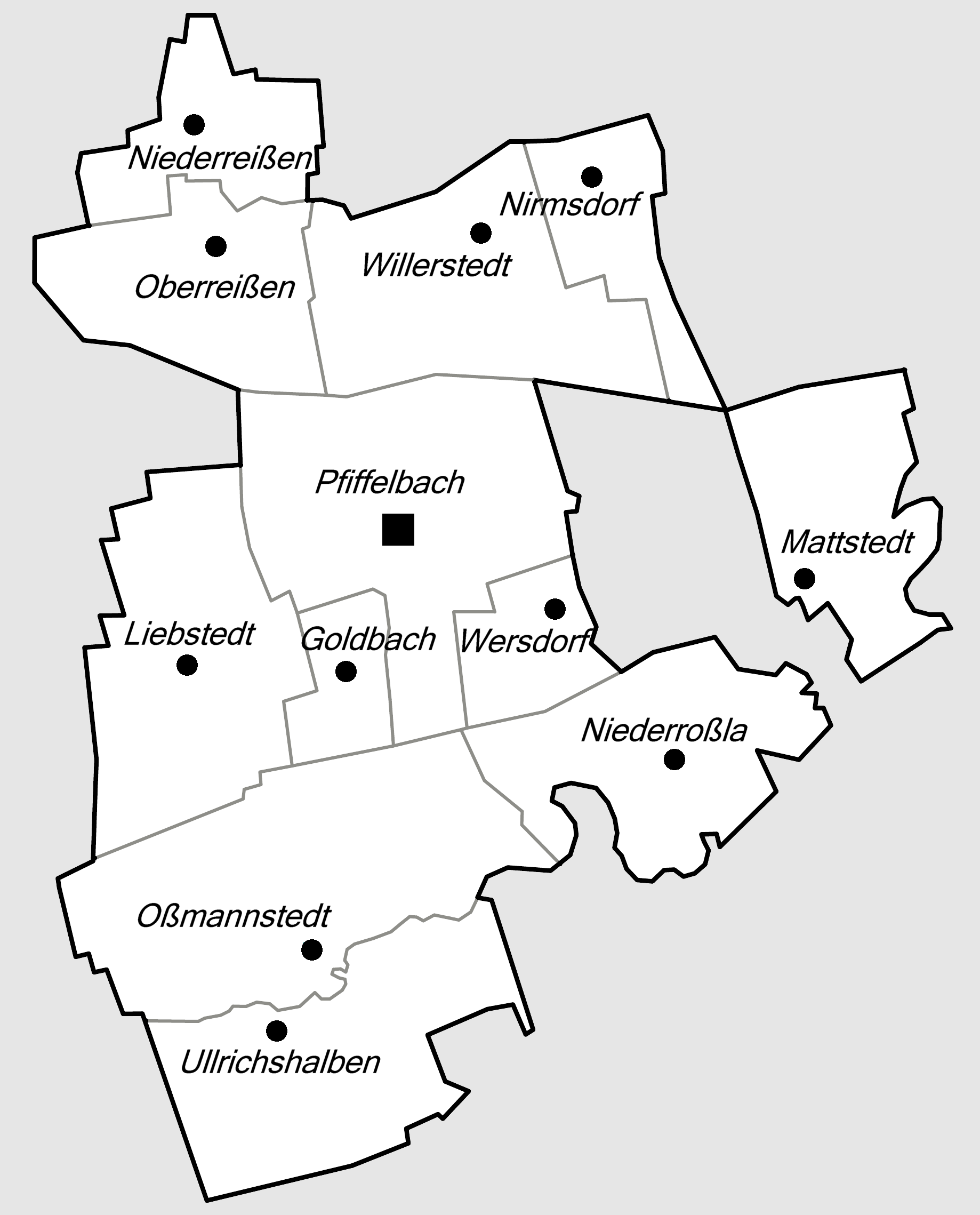 Gemeindegliederung Ilmtal-Weinstraße.